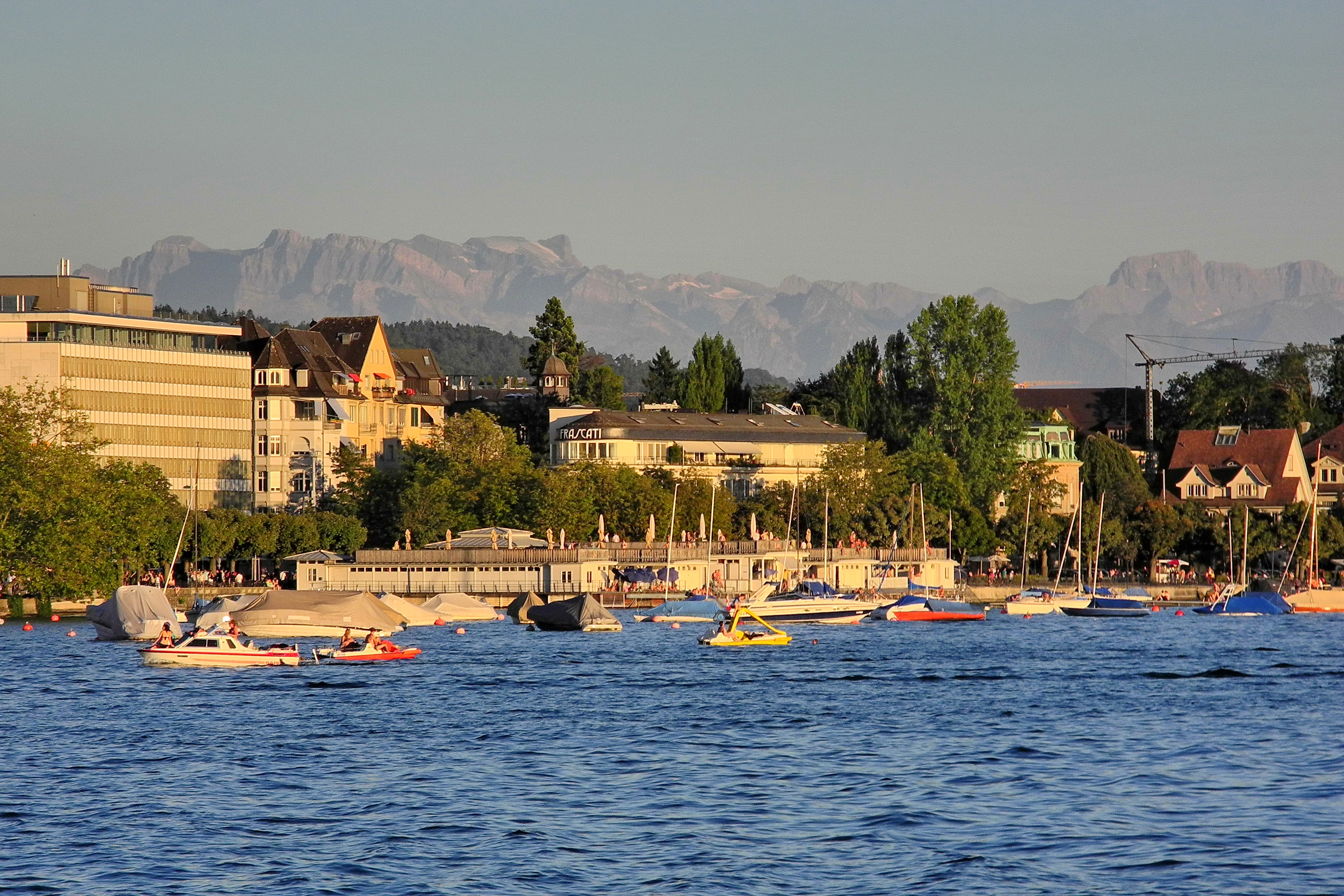 Seebad at Utoquai on Zürichsee lakeshore in Zürich (Switzerland) as seen from Quaibrücke